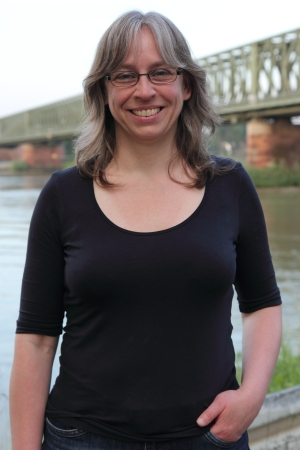 Antje Krause (* 1966), Bioinformatikerin und Hochschullehrerin